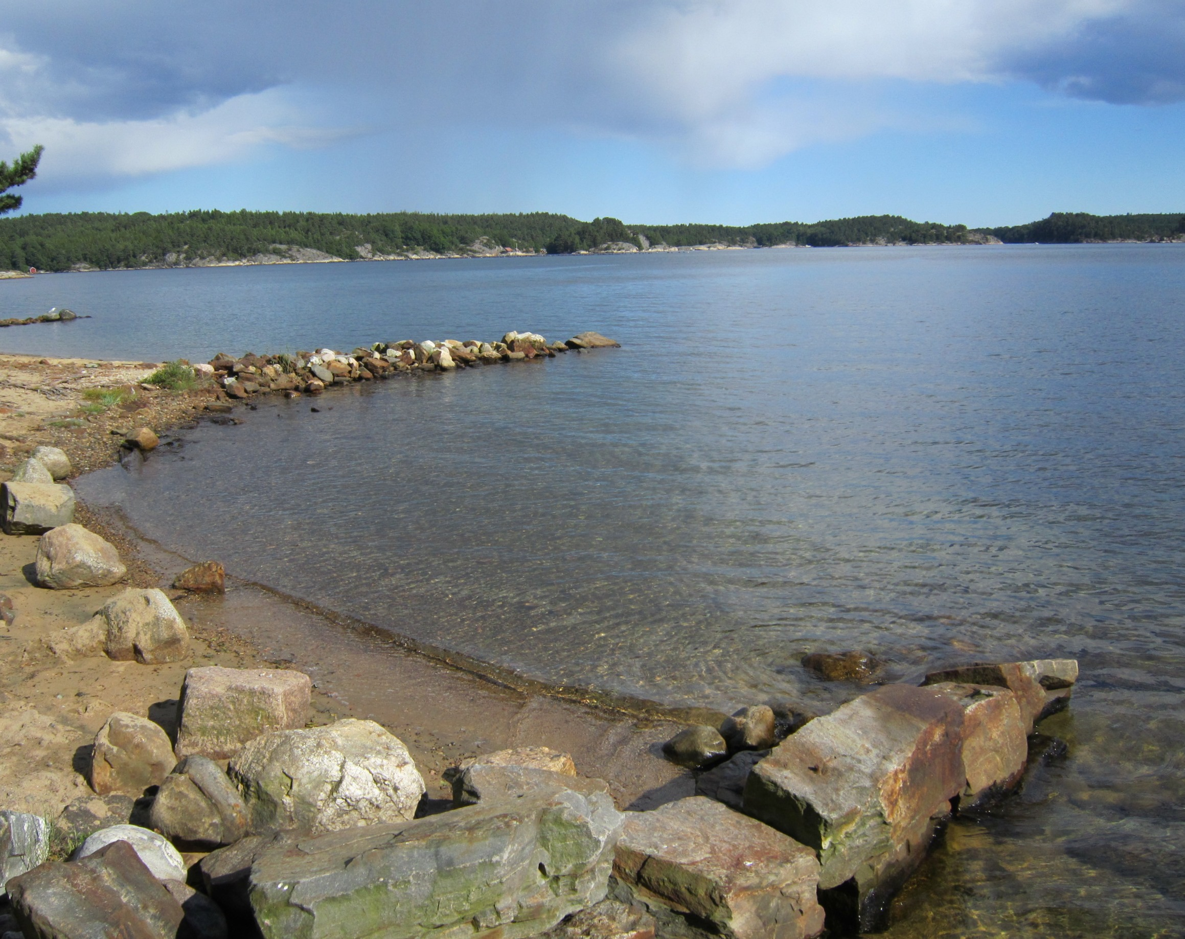 Kaldvellfjorden i Lillesand kommune